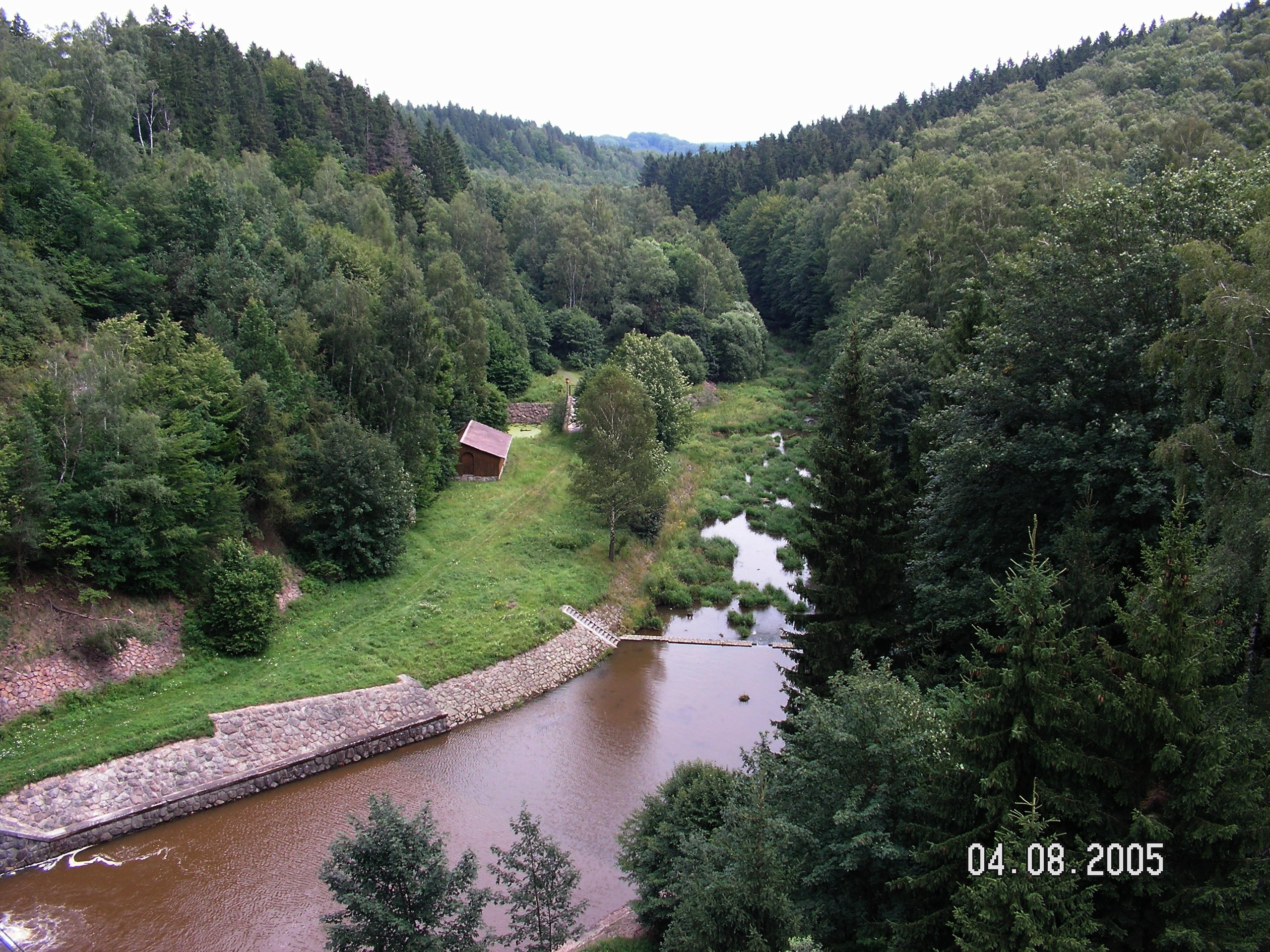 Řeka Chrudimka pod Sečskou nádrží